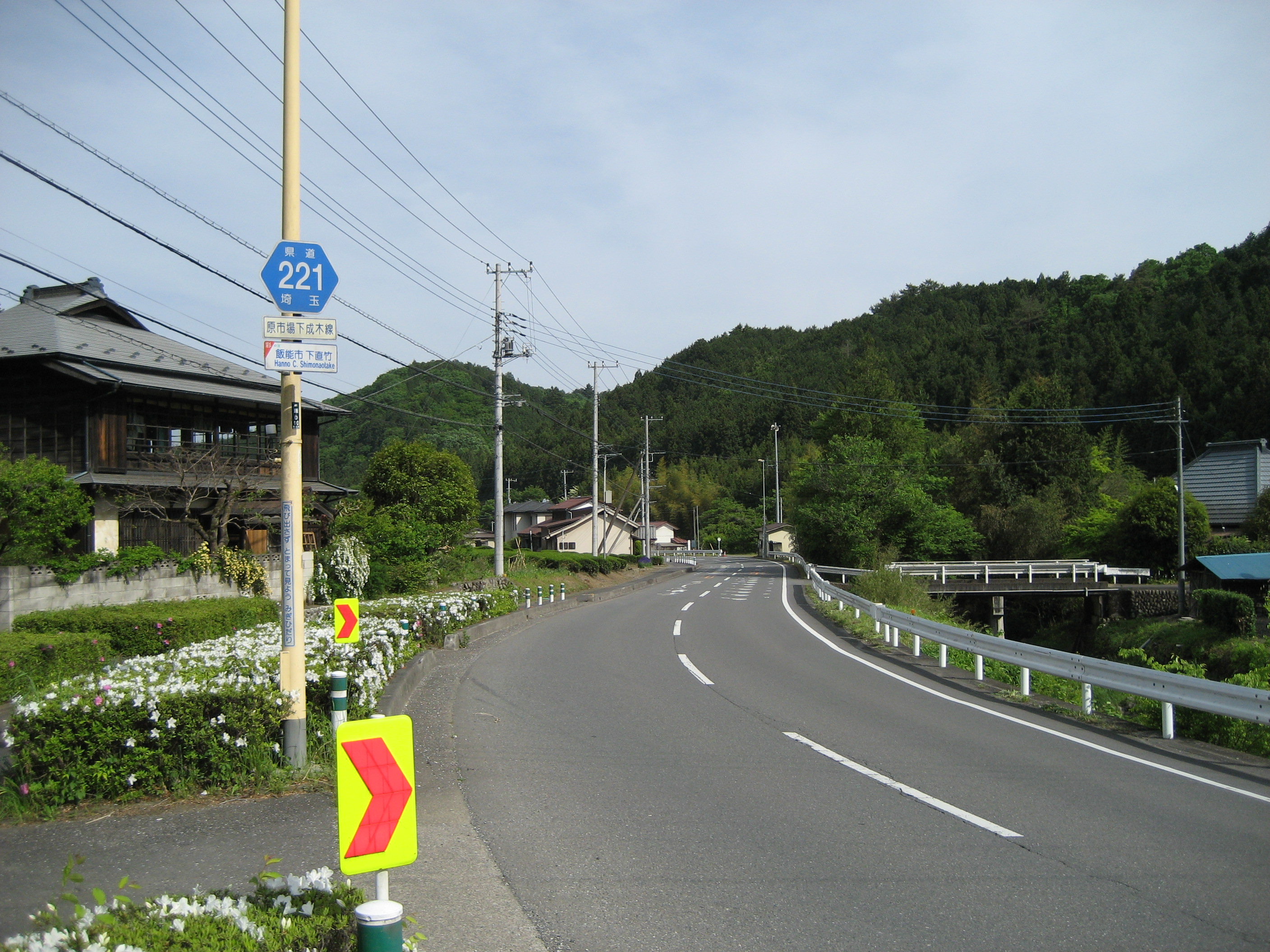 埼玉県道221号線飯能市内